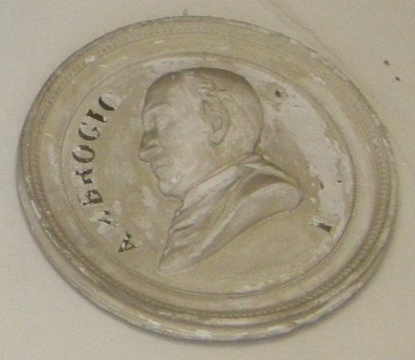 Specola, medaglione di ambrogio